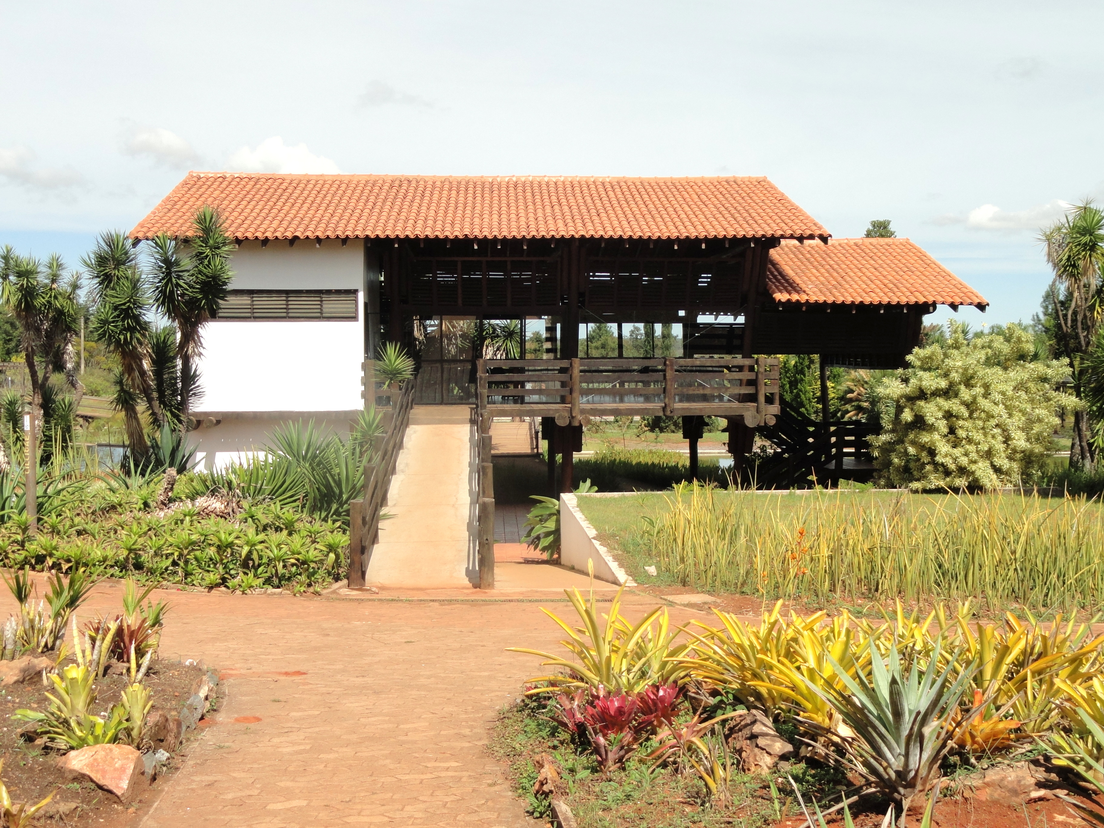 Jardim Botânico de Brasília, Brasília, Brazil.